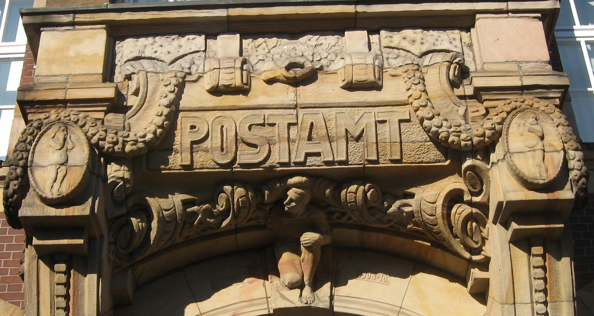 Erkerdetail, rechts und links der Inschrift "Postamt" zwei Medaillons mit telefonierenden Putten. Das Haus war als Post- und Telegraphenamt ausgelegt und enthielt eine große Telefonvermittlungszentrale.